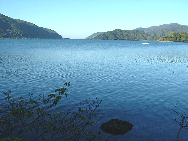 舞鶴湾 乙礁付近から湾口を望む